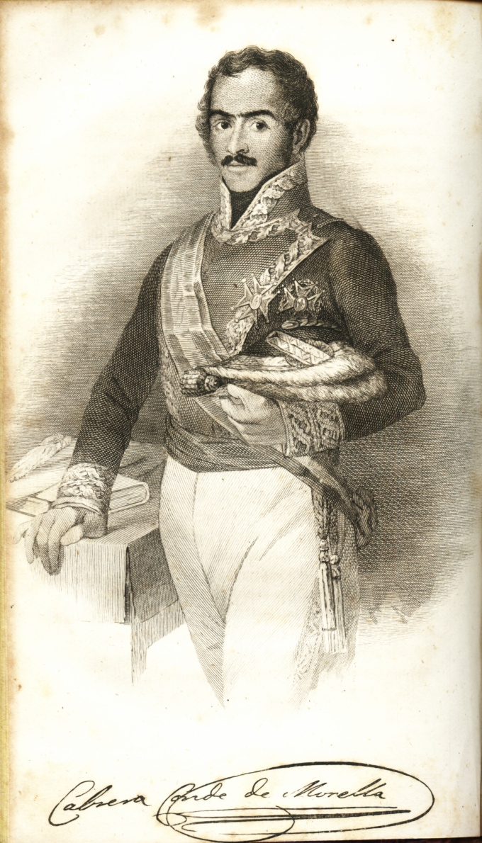 Retrato_de_general. Tomo III. 1845